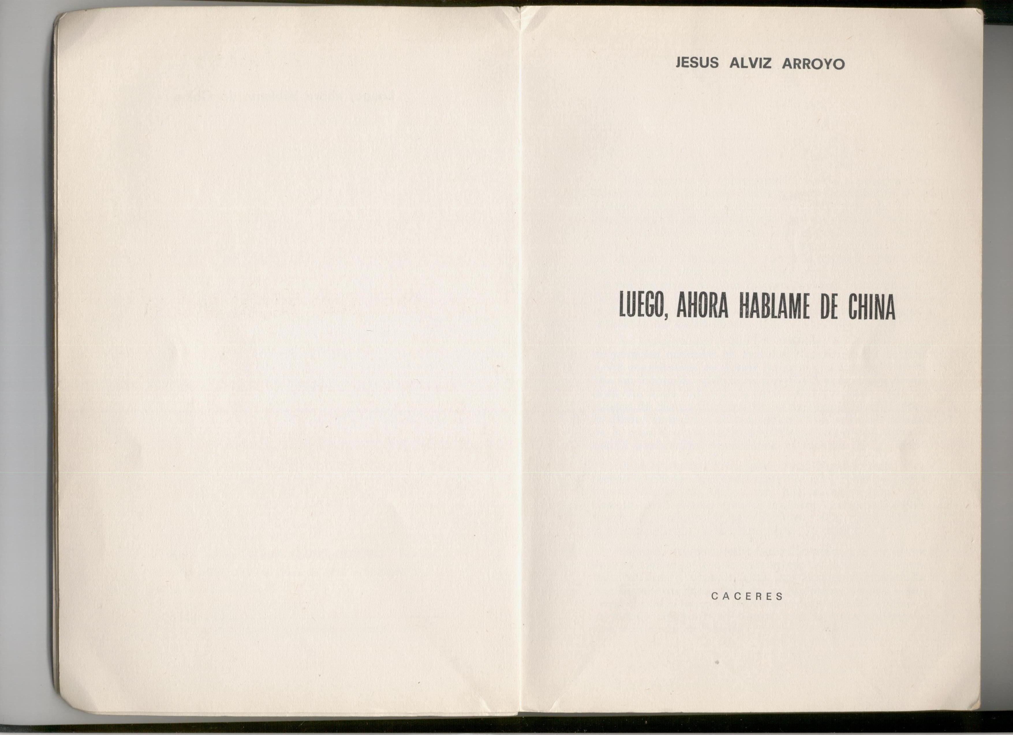 Jesús Alviz. Luego, ahora háblame de China. Cáceres: El autor. 1977. Imagen de portada. Q56660391 (1946–1998) DescriptionSpanish novelist and playwrightDate of birth/death 1946 9 November 1998Location of birth/death Acebo CáceresAuthority control : Q56660391 creator QS:P170,Q56660391